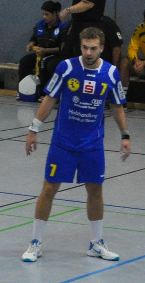 Der Handballspieler Johannes Müller vom HSV Peenetal Loitz beim Spiel gegen den Stralsunder HV am 30. Oktober 2010 in der Vogelsanghalle Stralsund.